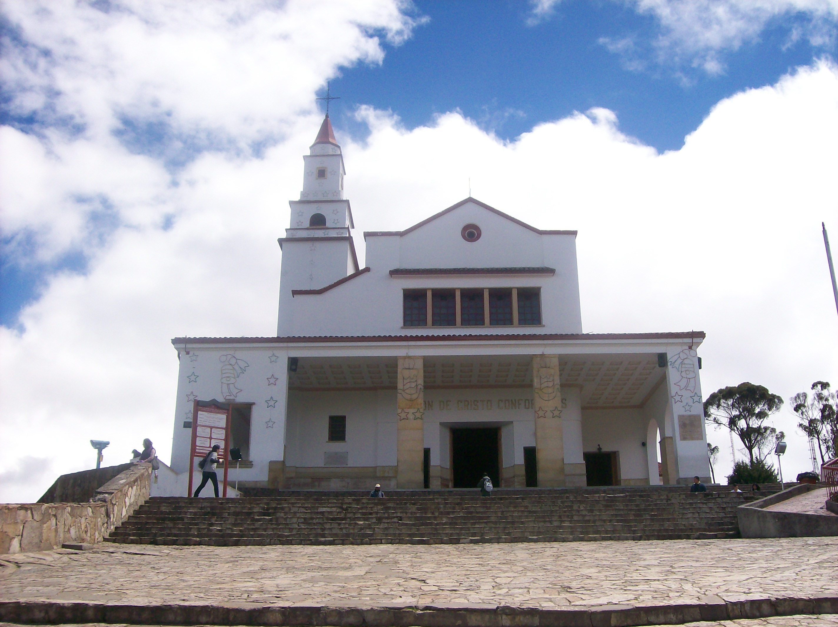 Iglesia de Monserrate, en Bogotá